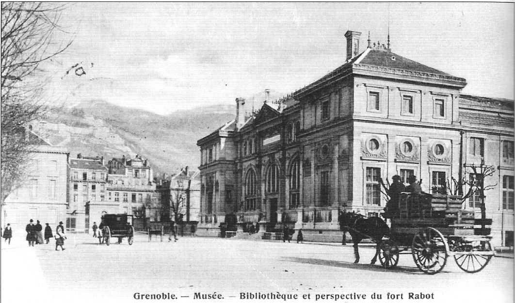 Musée-bibliothèque de Grenoble sur la place de la Constitution, vers 1895.